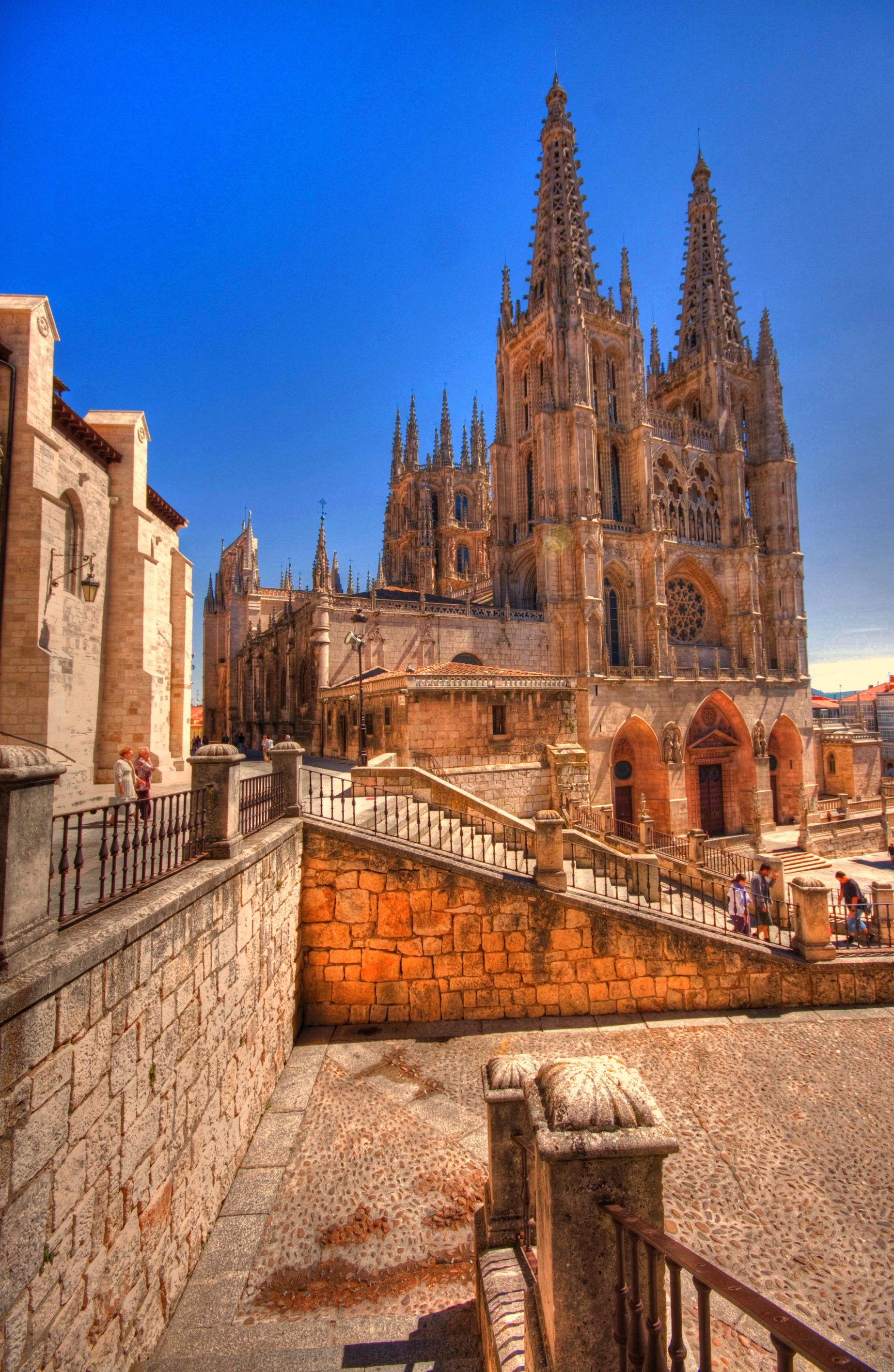 La Catedral de Burgos es una catedral dedicada a la Virgen María. Su construcción comenzó en 1221, siguiendo patrones góticos franceses.